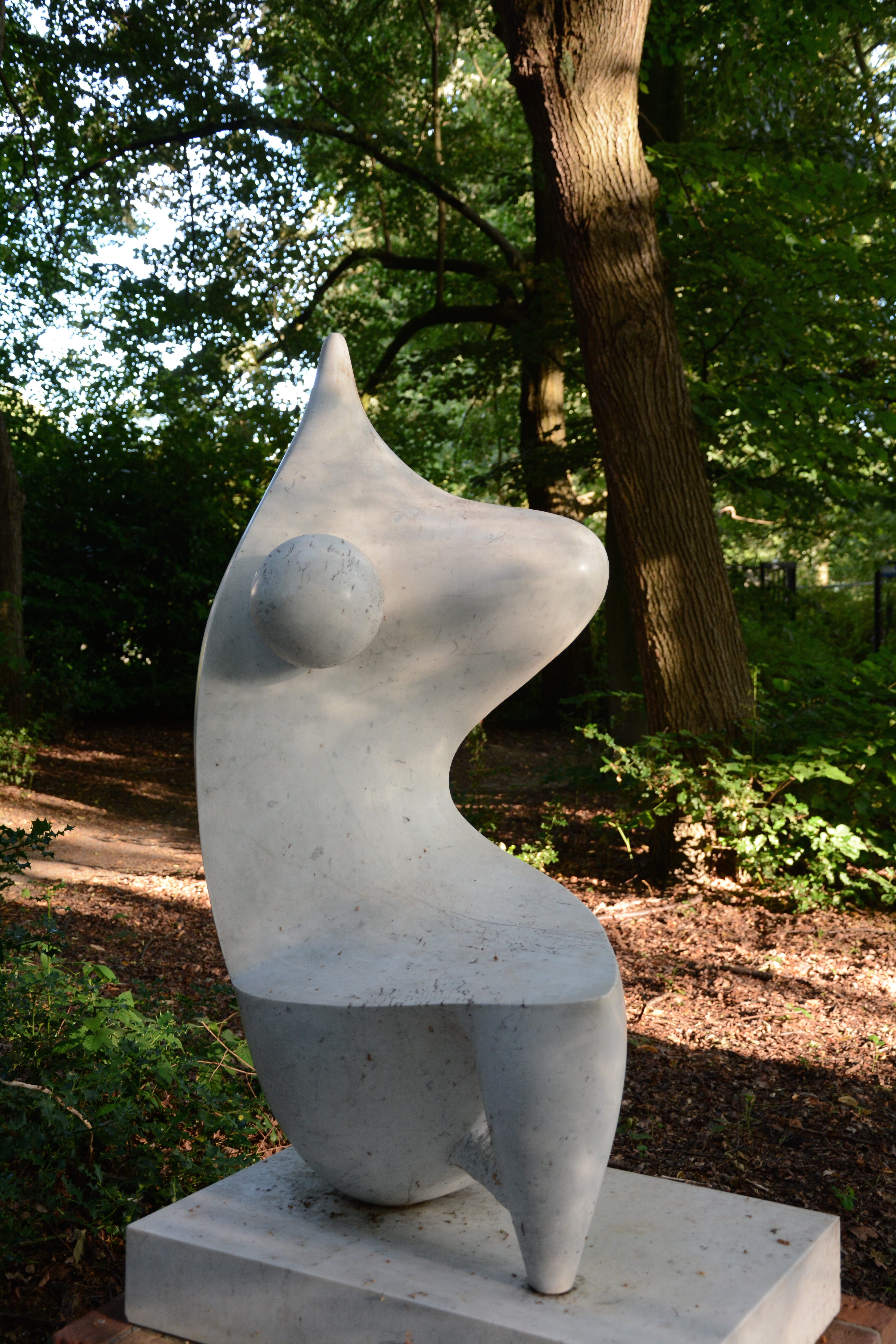 Alberto Viano, Abstract naakt,1949